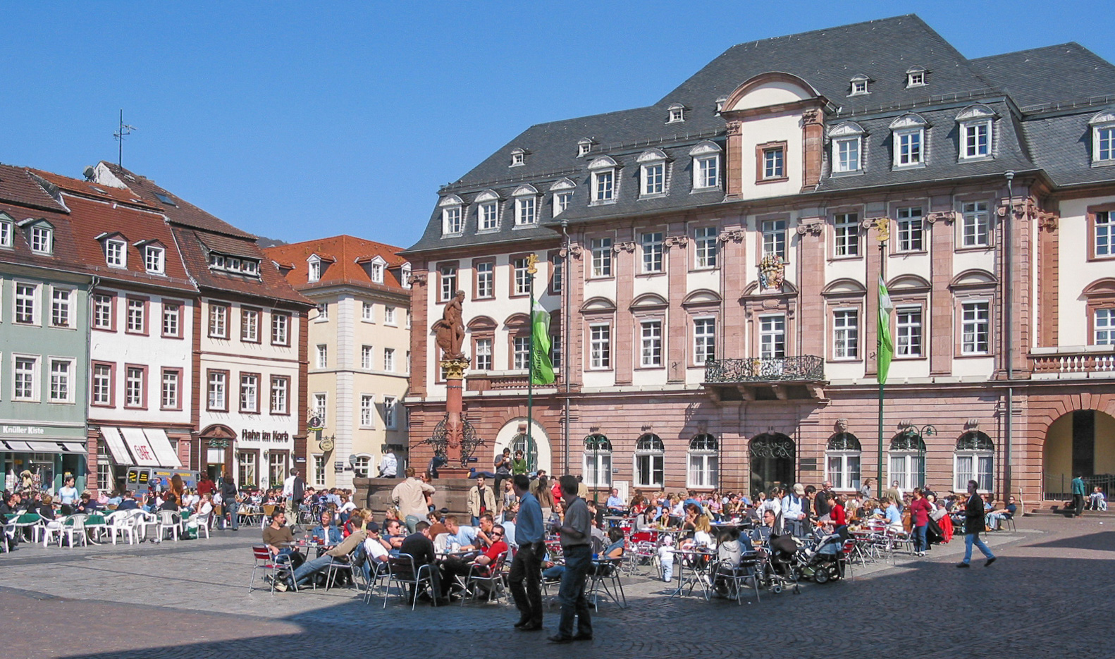 Heidelberger Rathaus und Herkulesbrunnen am Marktplatz